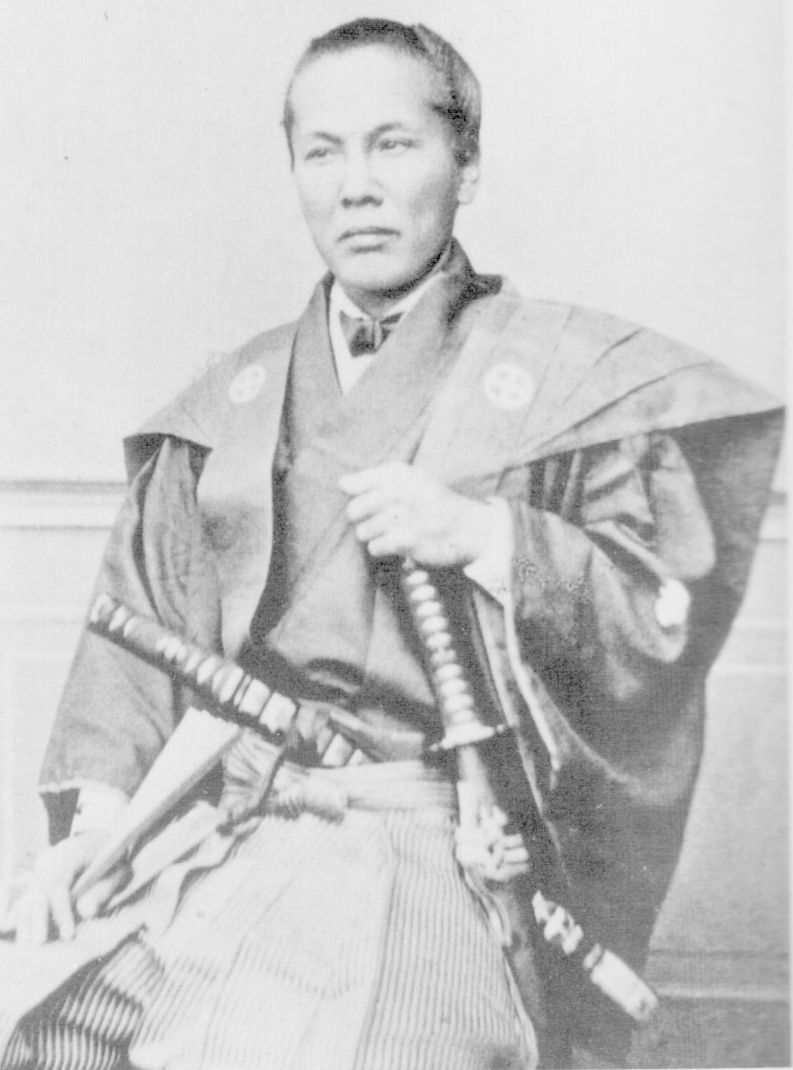 オランダへ渡った田口俊平 (付知町・慶応元年) 勝海舟らとともに渡蘭した際、現地にて撮影したもの。